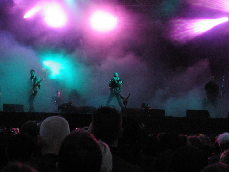 The Sisters Of Mercy, Mera Luna 2005